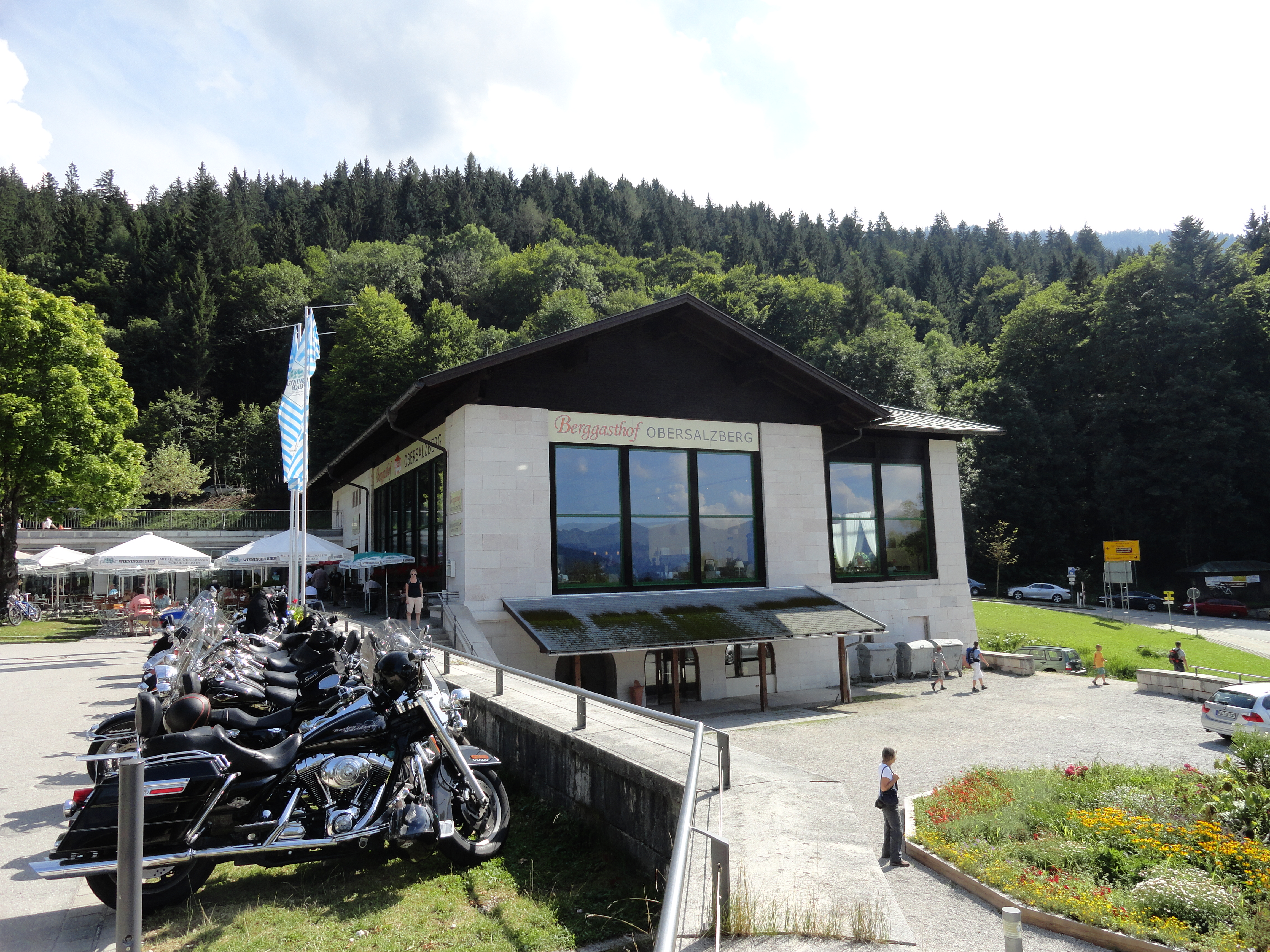 Terrassenhalle